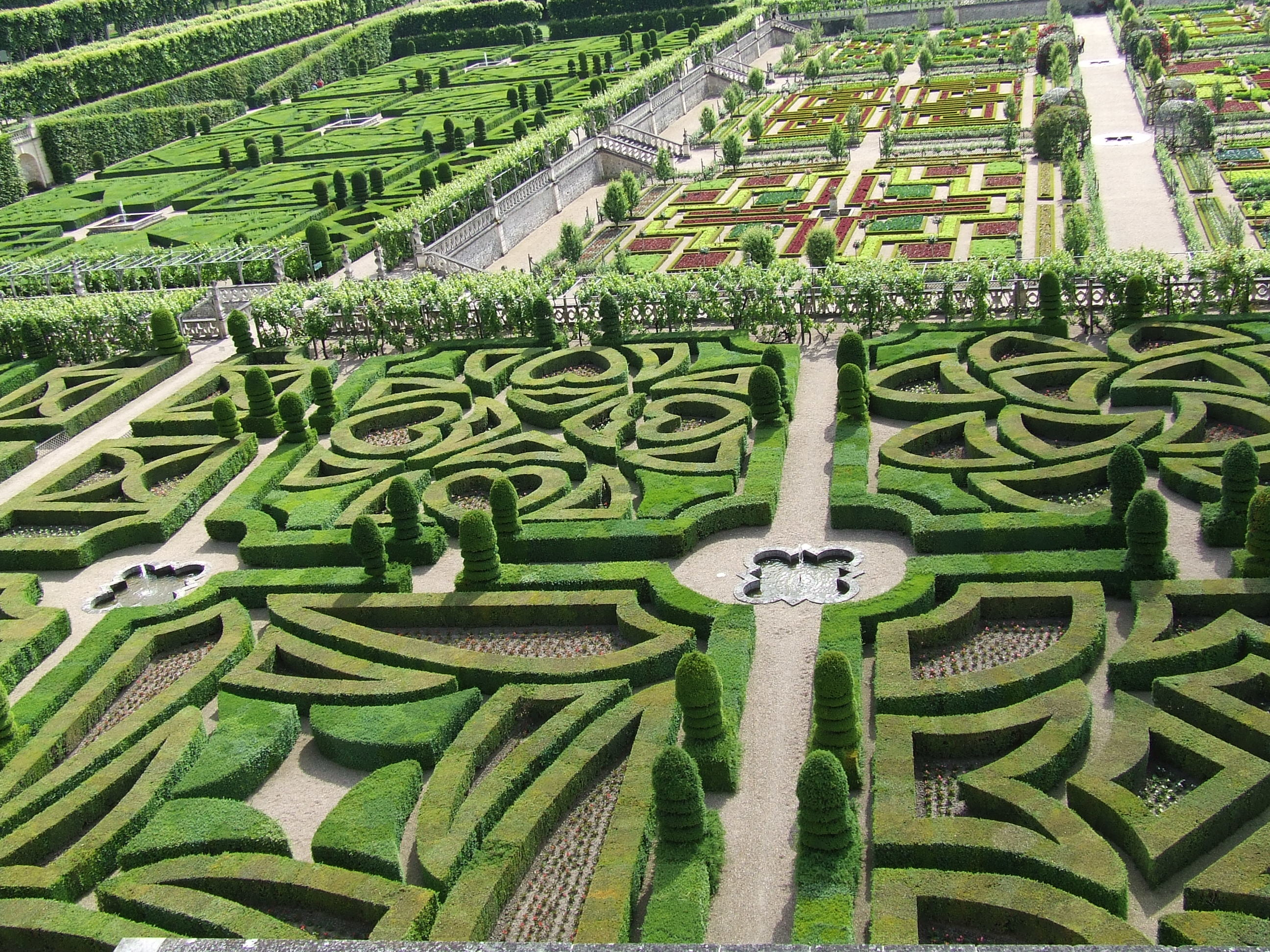 Ornamental formierter Liebesgarten im Schlossgarten von Château de Vaux-le-Vicomte